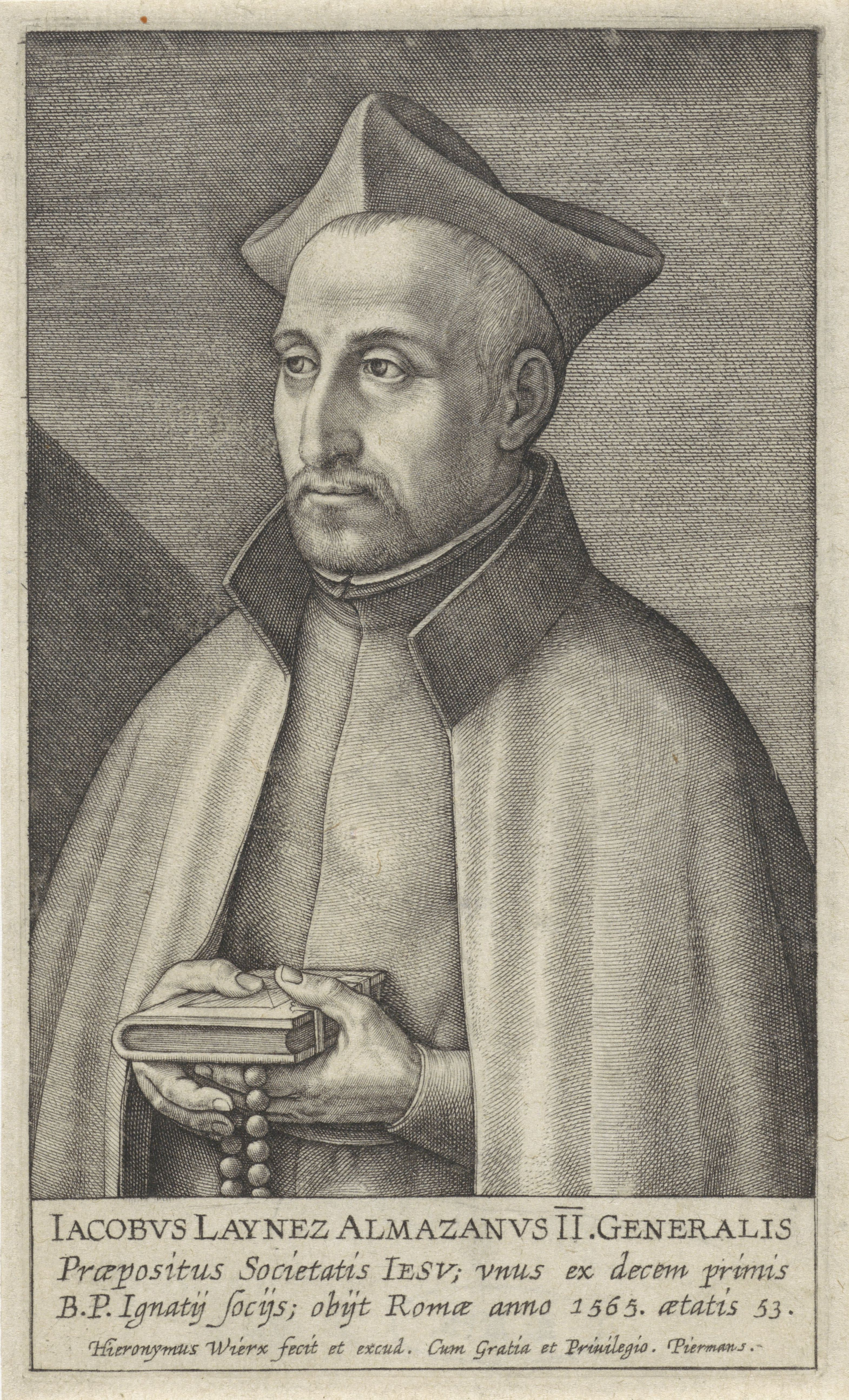 IdentificatieTitel(s): Portret van de jezuïet Jacobus LaynezPortretten van generaal oversten van de jezuïeten (serietitel)Effigies præpositorvm generalivm societatis Iesv (serietitel)Objecttype: prent Objectnummer: RP-P-1910-4016Catalogusreferentie: Hollstein Dutch 2016-2(3)Opschriften / Merken: verzamelaarsmerk, verso onder, gestempeld: Lugt 2228Omschrijving: Portret van de jezuïet Jacobus Laynez, in zijn handen een bijbel en een rozenkrans. In de marge een drieregelig onderschrift in het Latijn.VervaardigingVervaardiger: prentmaker: Hieronymus Wie: rix (vermeld op object)uitgever: Hieronymus Wierix (vermeld op object)verlener van privilege: Piermans (vermeld op object)Plaats vervaardiging: AntwerpenDatering: 1615 - 1619Fysieke kenmerken: gravureMateriaal: papier Techniek: graveren (drukprocedé)Afmetingen: plaatrand: h 122 mm × b 72 mmOnderwerpWat: the Bible as a bookaids for prayer, e.g. rosaryWieDiego LaynezVerwerving en rechtenVerwerving: aankoop 1910Copyright: Publiek domein